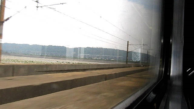 台鐵海岸線下大甲溪橋(1987) was filmed by TDCKW on 20140525